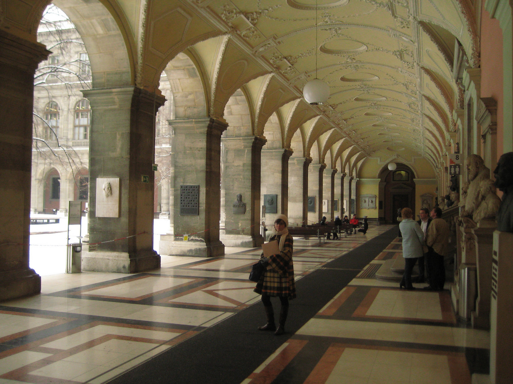 Arkadenhof im Hauptgebäude der Universität Wien, Wien, Österreich